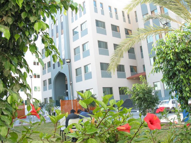 صورة لمبنى الإدارة بالكلية الجامعية للعلوم التطبيقية